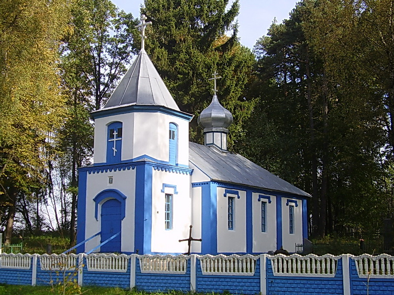 Крайск. Свята-Аляксееўская царква